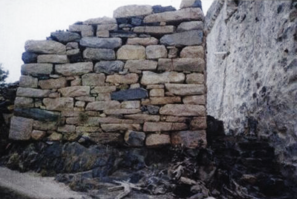 حصون بلاد قبيلة حوالة